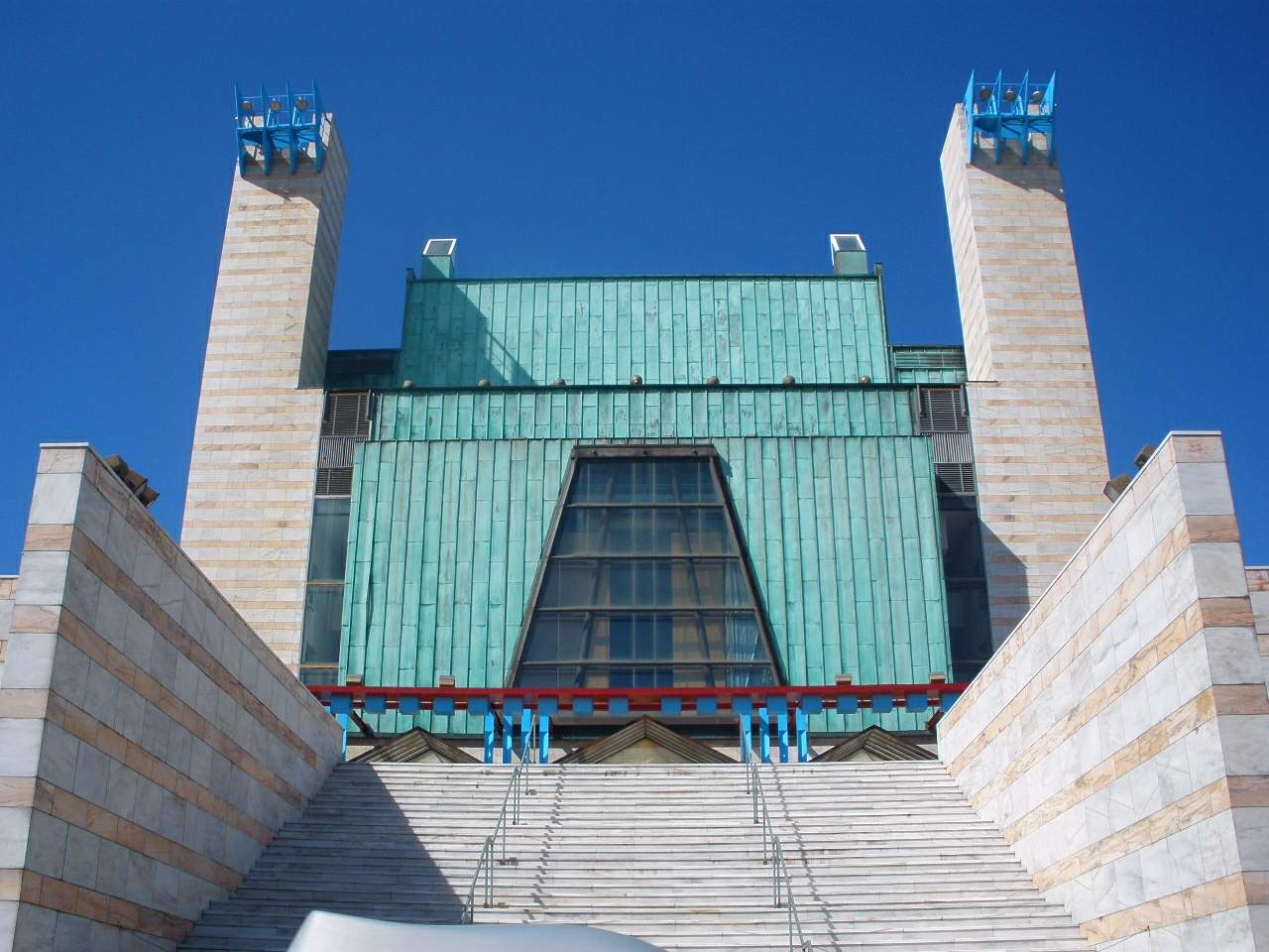 El Palacio de Festivales de Cantabria, en Santander, un engendro de la arquitectura posmoderna parido por Francisco Sáenz de Oiza informal y malévolamente conocido como "el perro panza arriba".